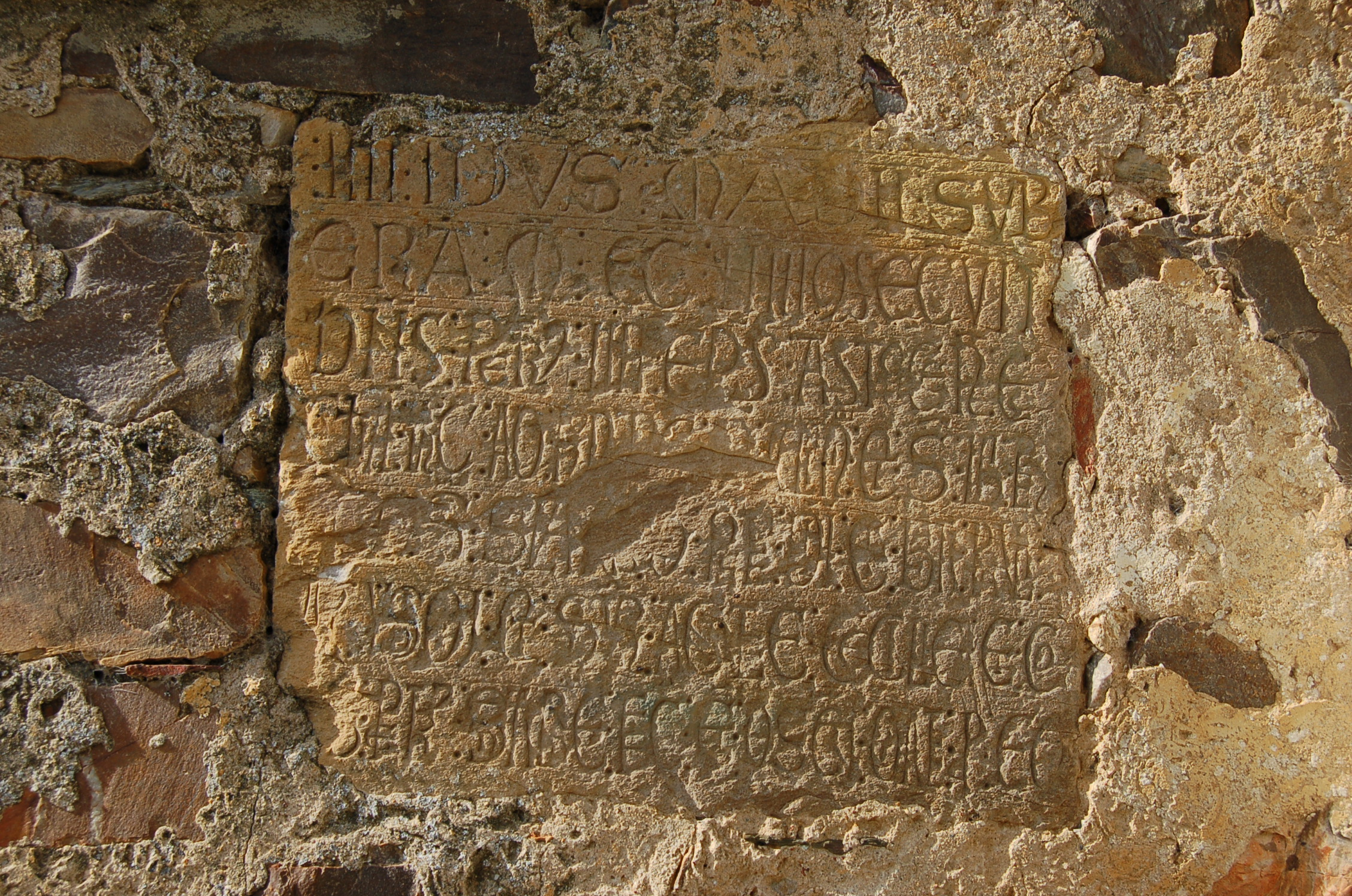 Pedra no muro sur da igrexa de Mózar. IIII IDUS MADII SUB ERA M CC L IIII CONSECRAVIT DOMINUS PETRUS, IIII EPISCOPUS ASTORICENSIS, EC CLESIAE HIC AD HON[O]RE[M...] NI ET SUNT IBI RE CONDITE SUNT (SIC) SUA[...] AS BEATI PAULI [...] OI ET SANCTARUM AGATE, CECILIE ET CO [...] SANCTUS PETRUS [...] SANCTI. ORATE PRO EO. O 12 de maio de 1216, don Pedro IV, bispo de Astorga, consagrou esta iglesia en honor de [...] e están aquí gardadas as súas reliquias e as do beato Paulo [...] e das santas Ágata, Cía e Co[...] San Pedro [...] santos. Orade por el. IIII IDUS MADII SUB ERA M CC L IIII CONSECRAVIT DOMINUS PETRUS, IIII EPISCOPUS ASTORICENSIS, EC CLESIAE HIC AD HON[O]RE[M...] NI ET SUNT IBI RE CONDITE SUNT (SIC) SUA[...] AS BEATI PAULI [...] OI ET SANCTARUM AGATE, CECILIE ET CO [...] SANCTUS PETRUS [...] SANCTI. ORATE PRO EO.